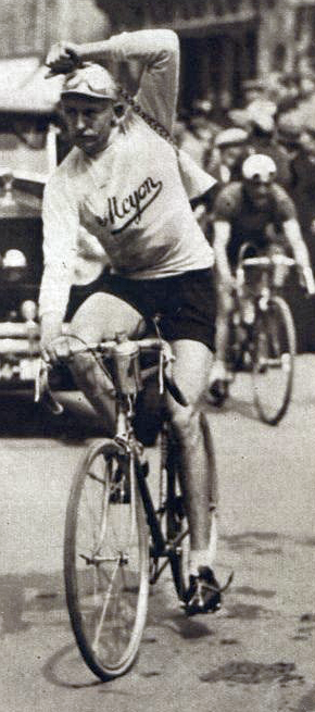 Gustave Danneels, vainqueur de Paris-Tours le 29 avril 1934.